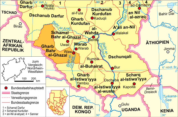 Politische Karte des Sudan (Bundesstaat Gharb Bahr al-Ghazal)